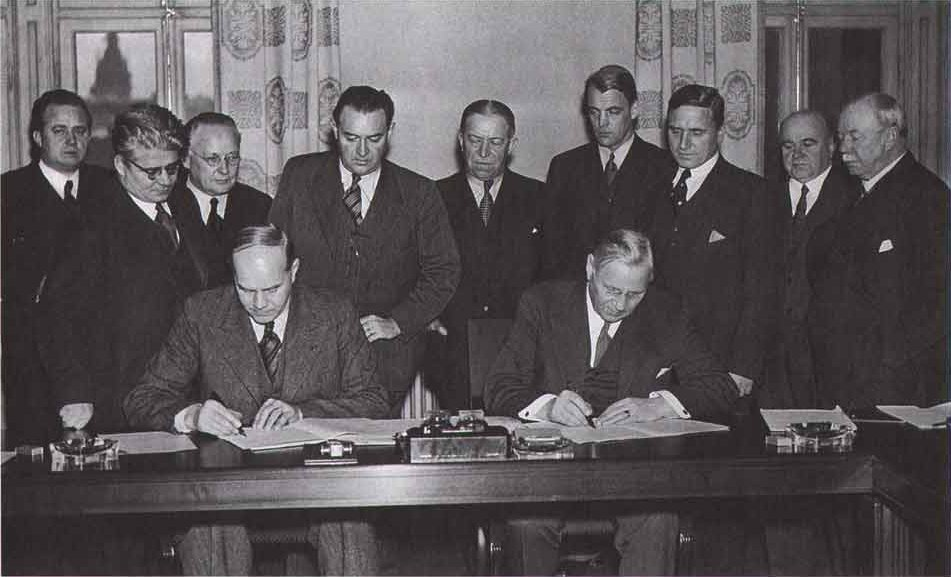 Underskrift av Saltsjöbadsavtalet 1938